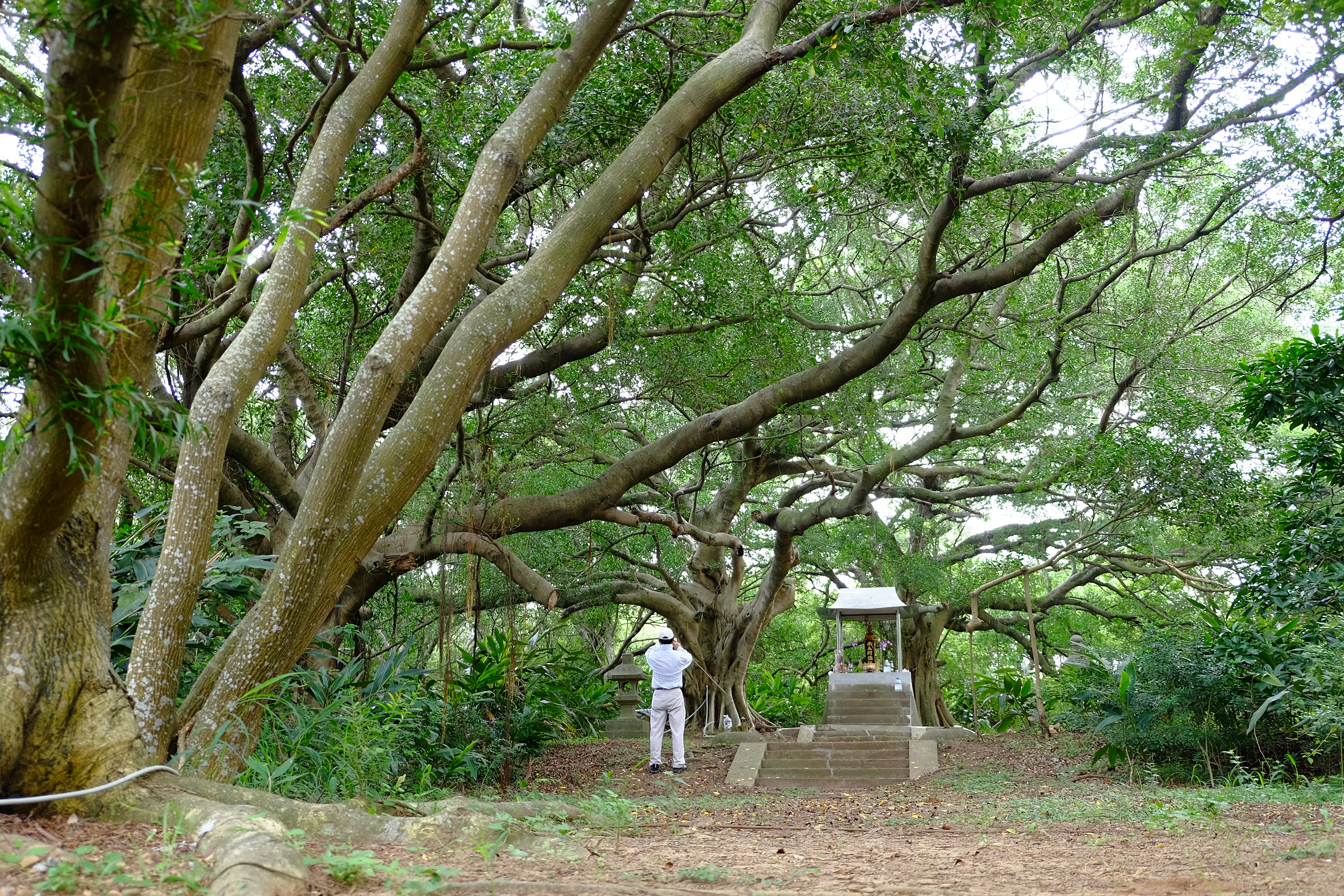 動物用藥品檢定分所小神社